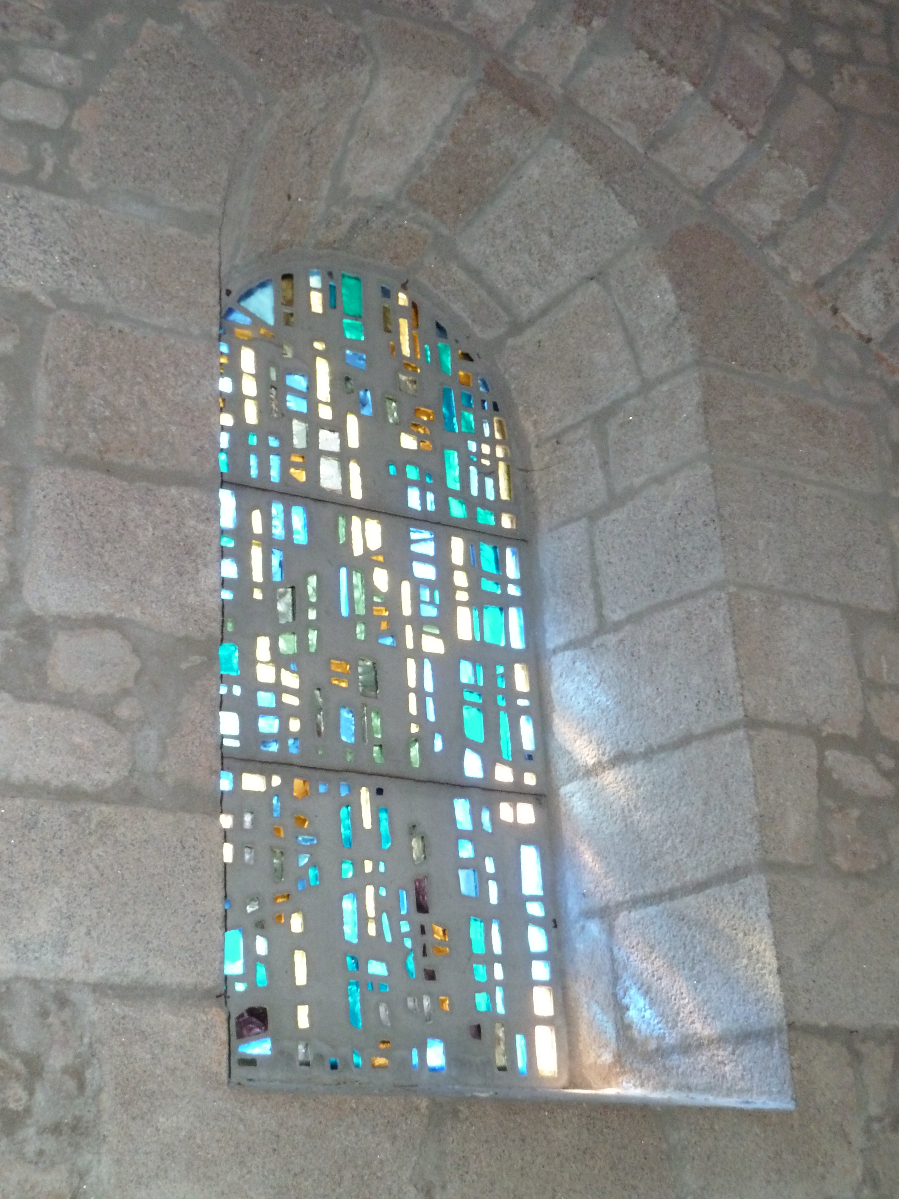 Razès - Eglise Vitrail XX°